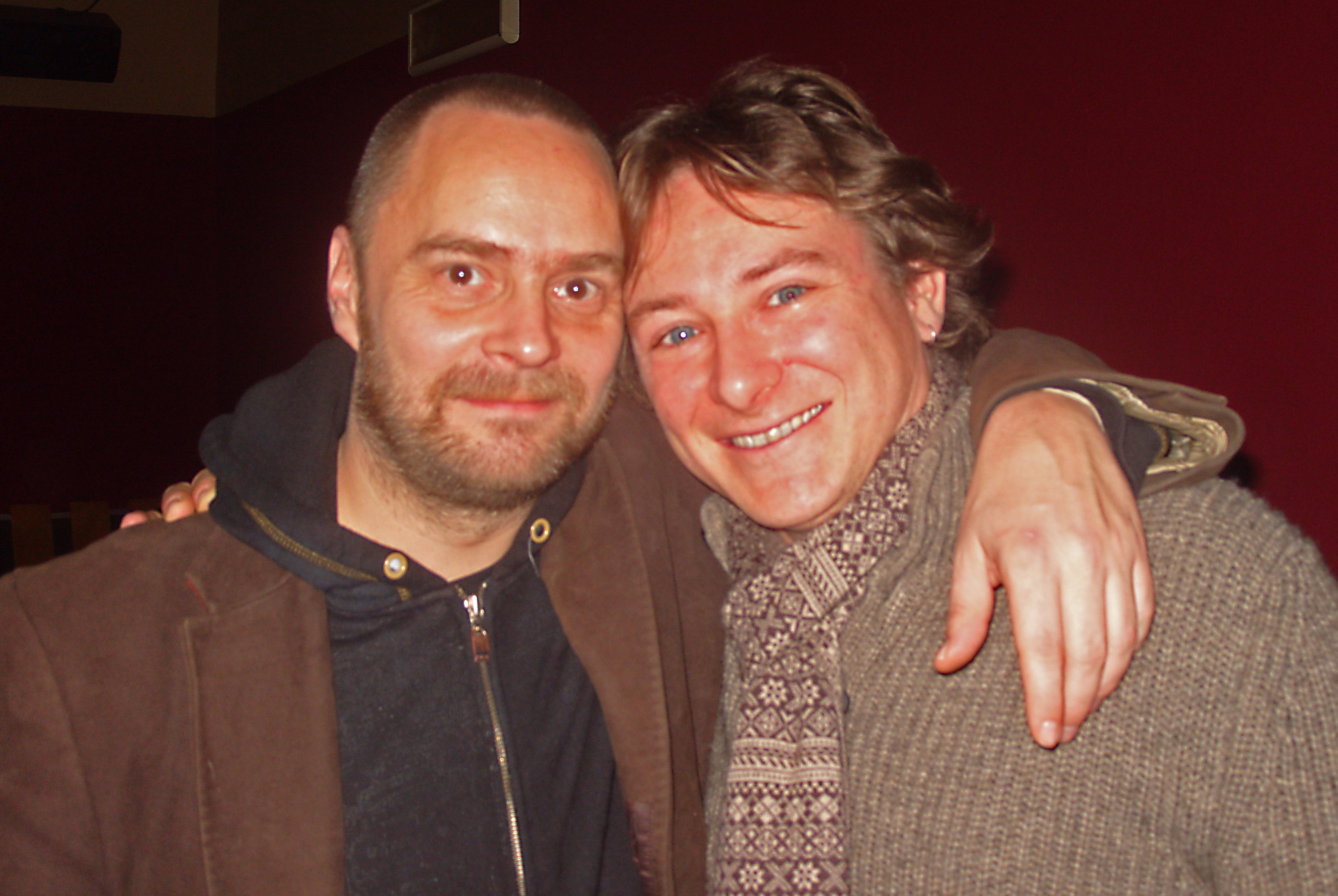 David Nathan und Simon Jäger nach einer Prima Vista Lesung in Berlin